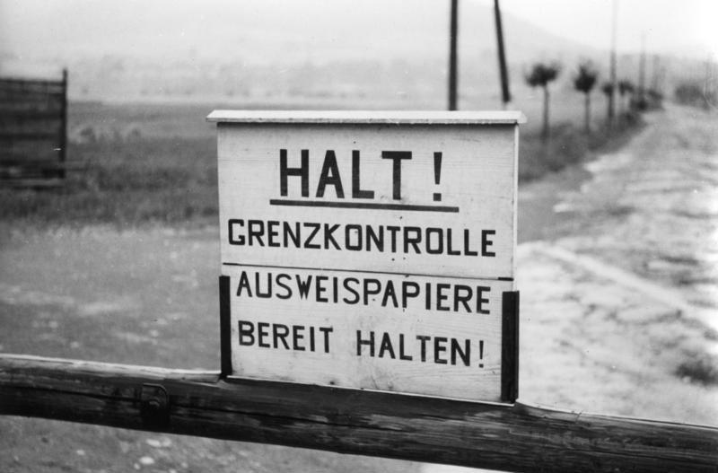 Zonengrenze bei Heldra 1952